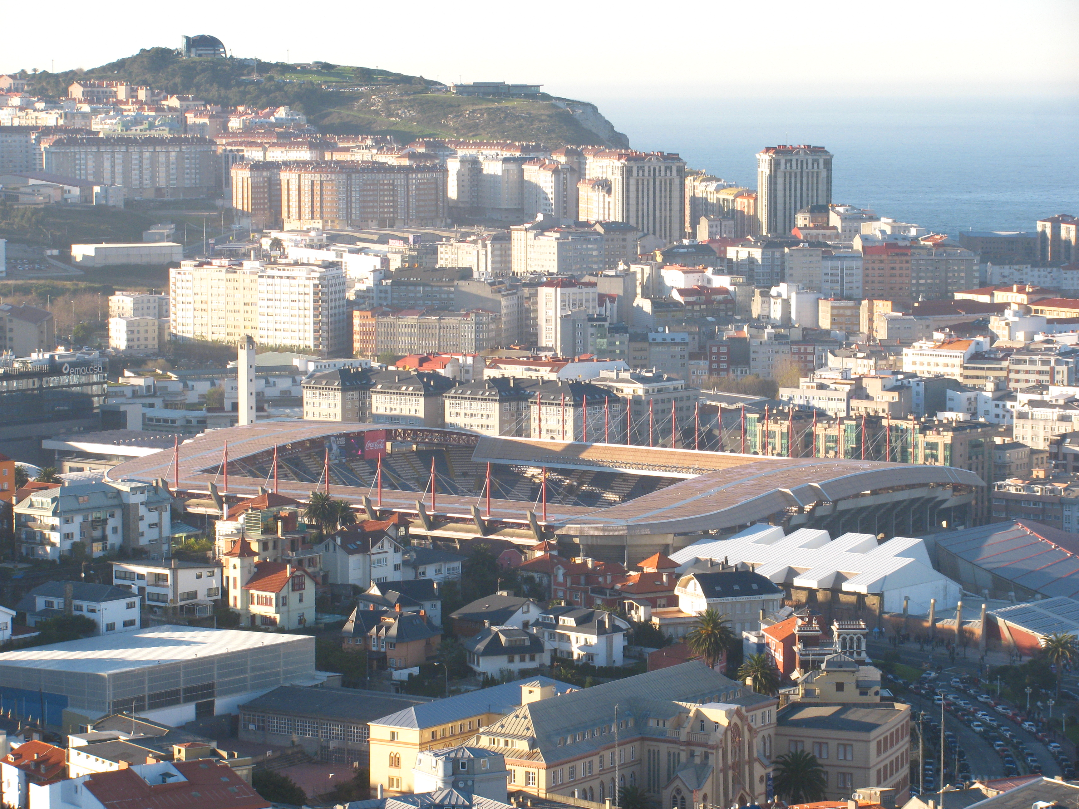 Estadio de Riazor (A Coruña).